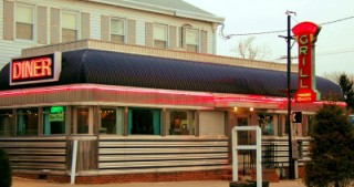 Dinner in Freehold NJ